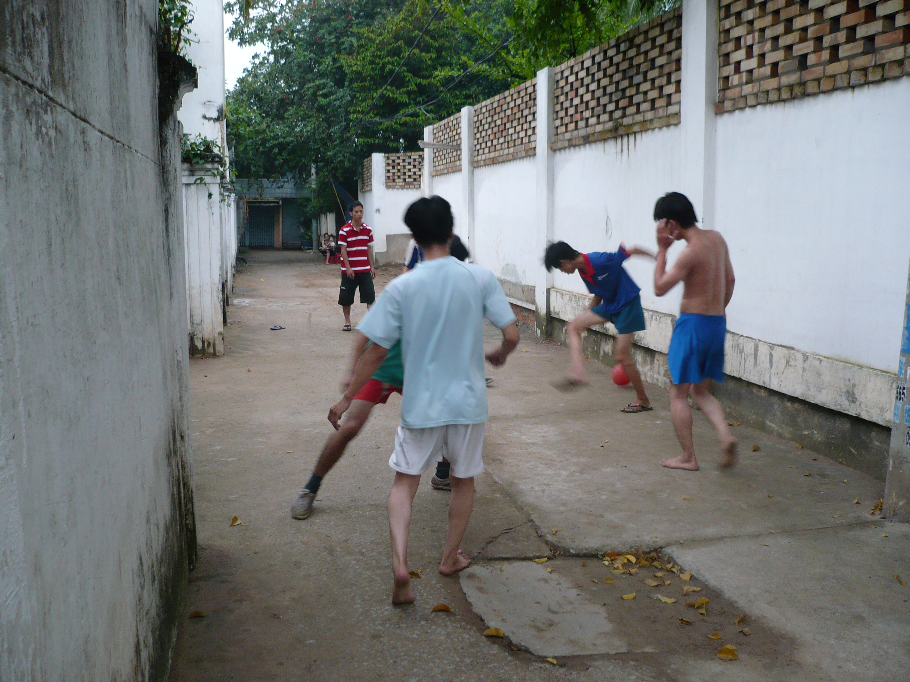 Bóng đá đường phố - ảnh tự chụp